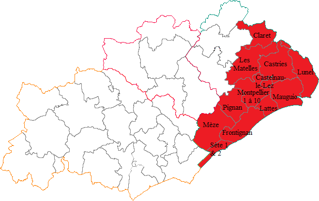 Carte des cantons composant l'arrondissement de Montpellier (Hérault)